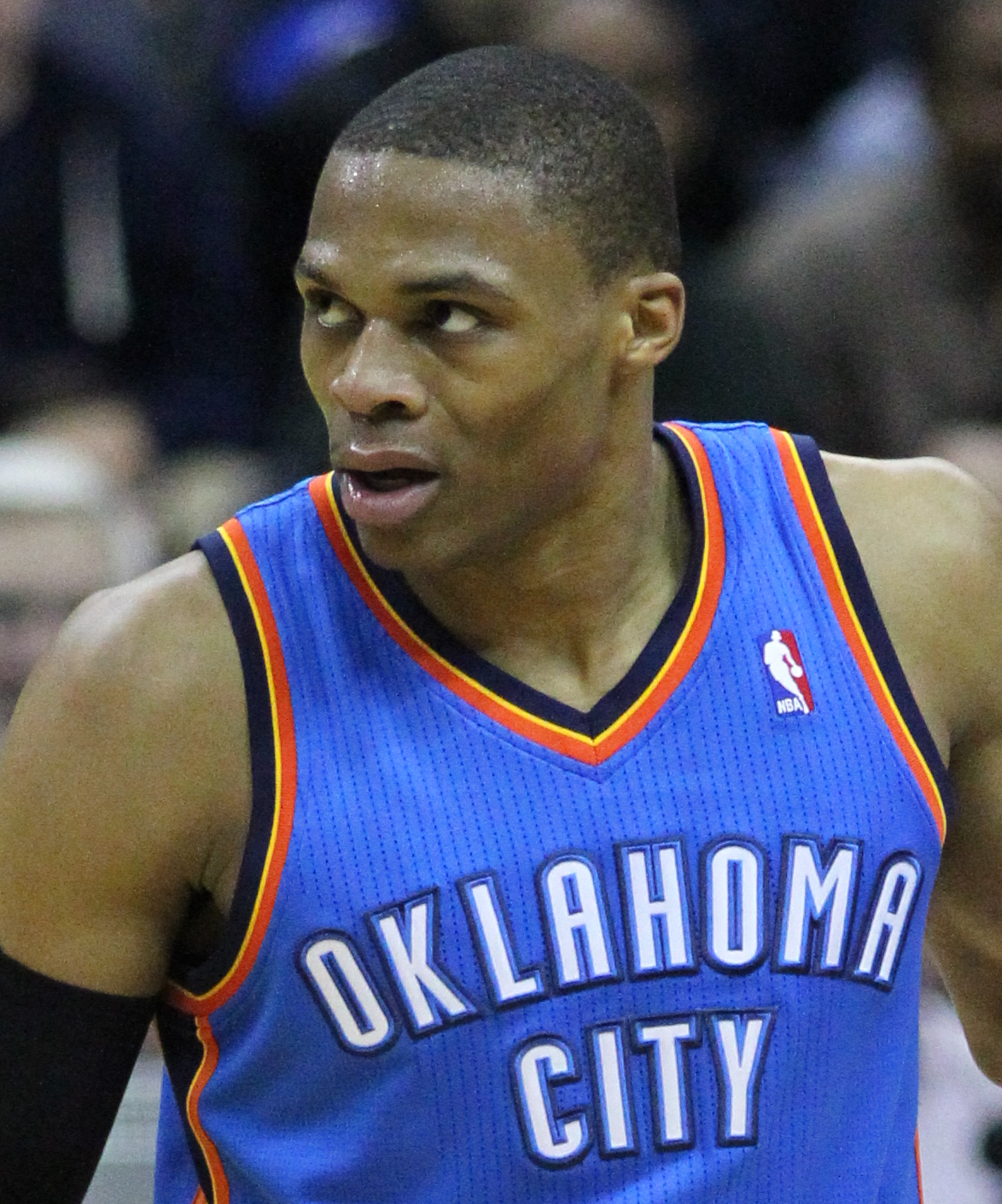 Wizards v/s Thunder 03/14/11